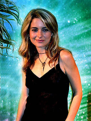 Cláudia Abreu, Brazilian actress